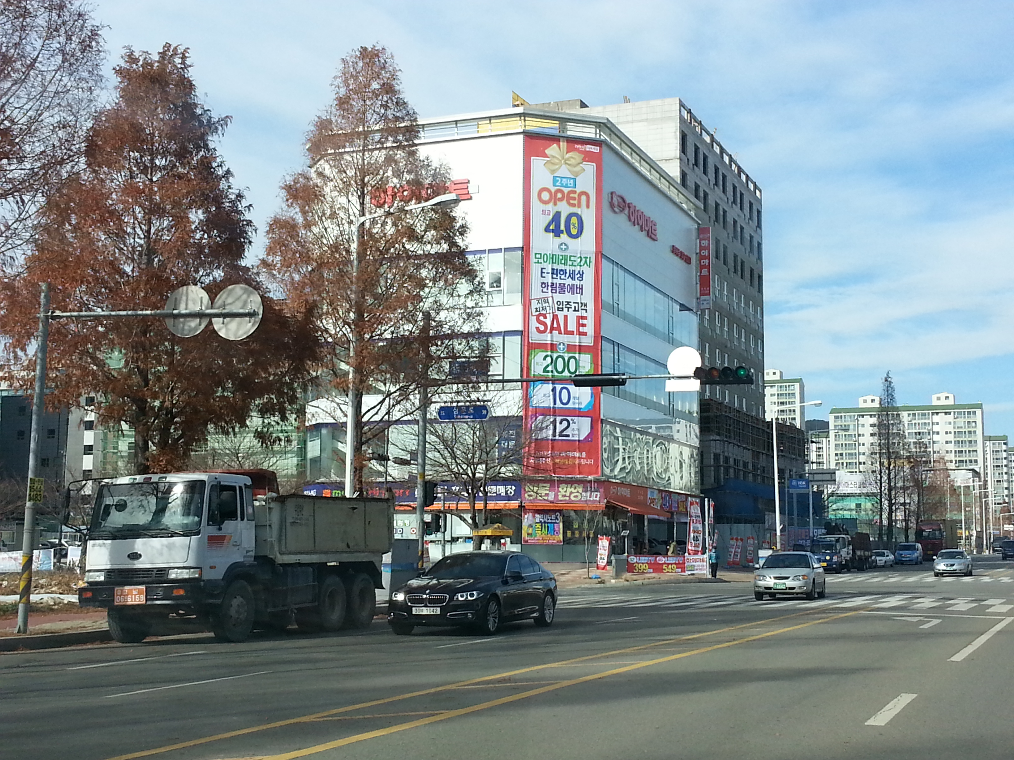 롯데하이마트 장유점의 모습이다.